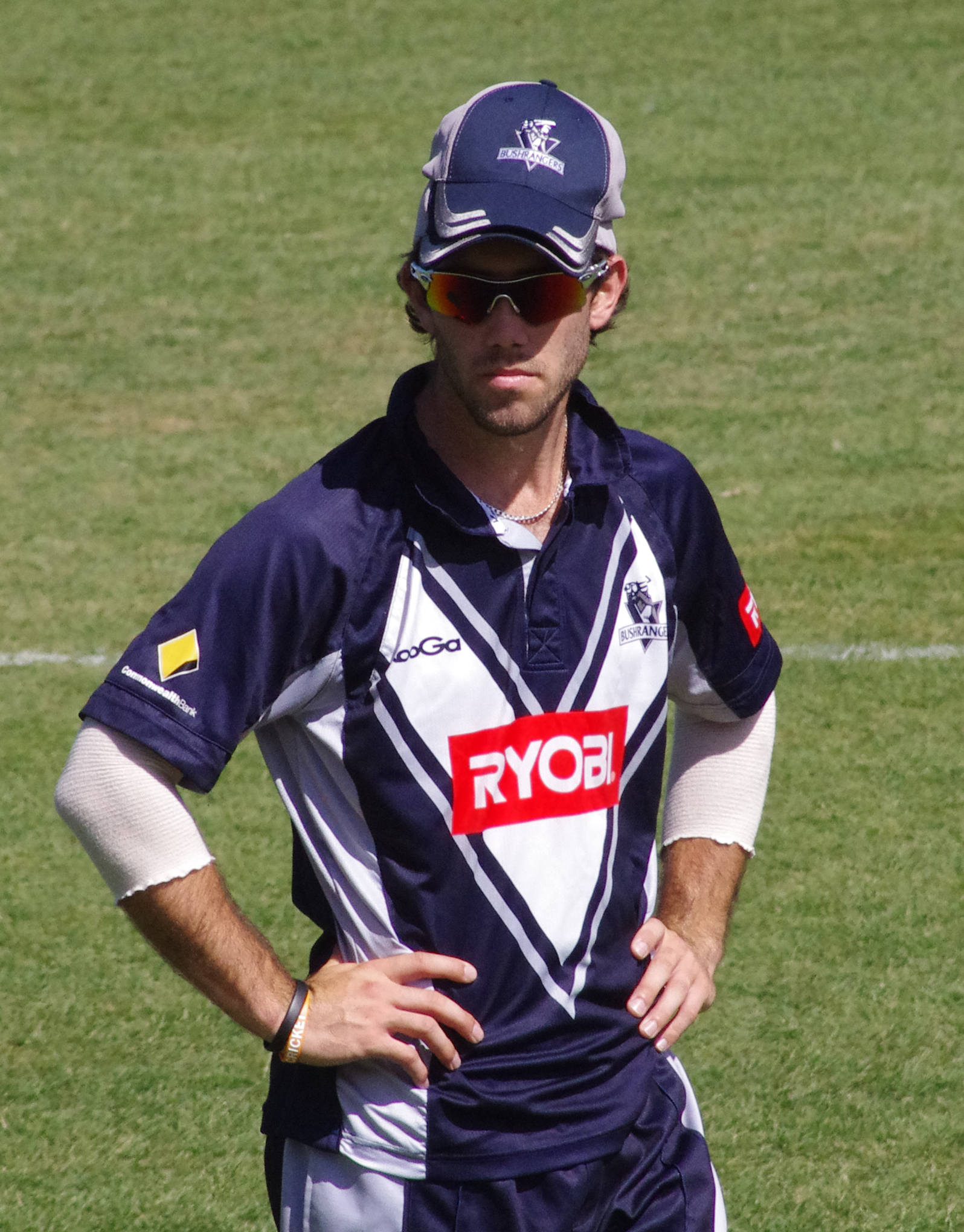 Glenn Maxwell